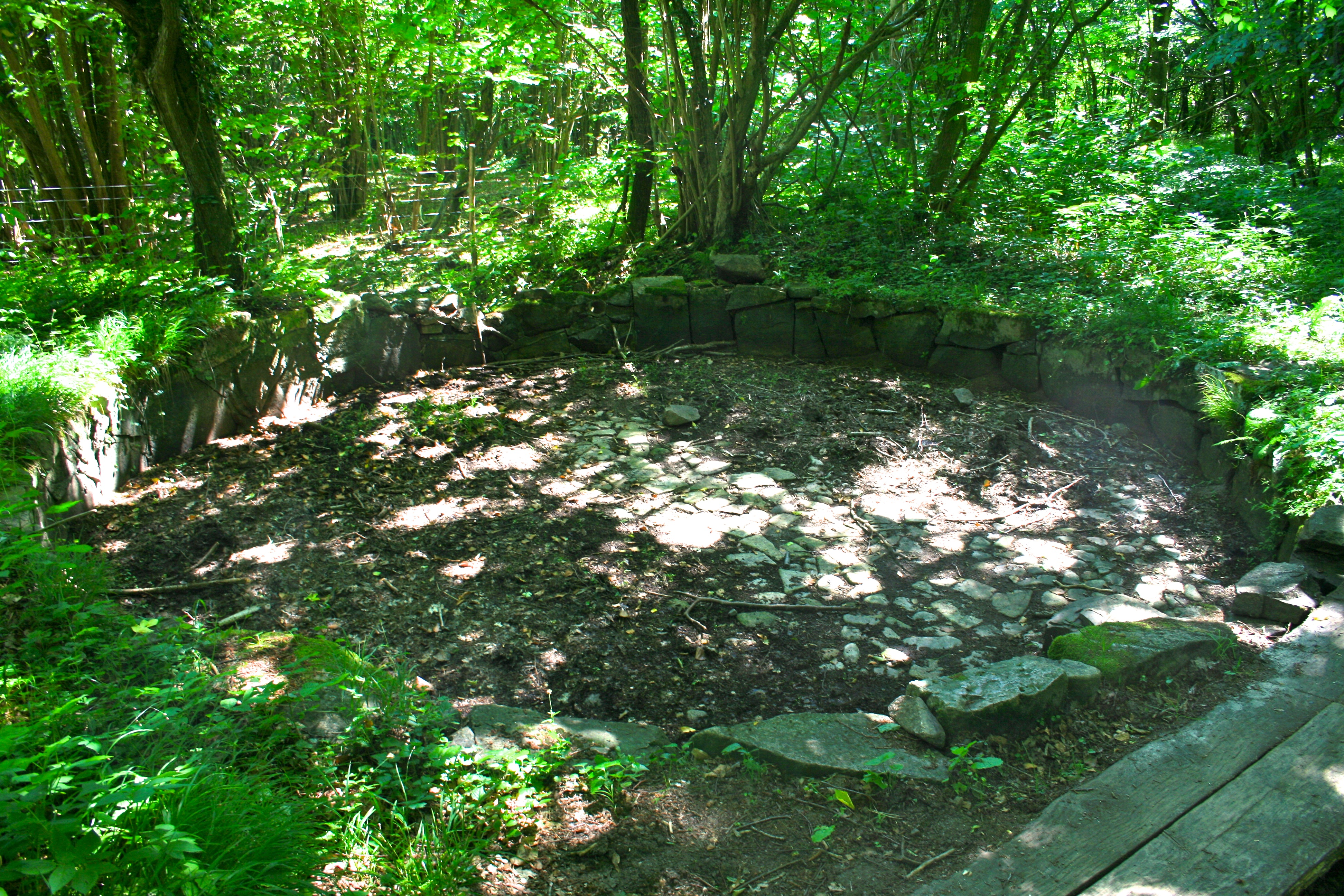 Torvtramp från 1800-talet nära Naturum i Stenshuvud nationalpark